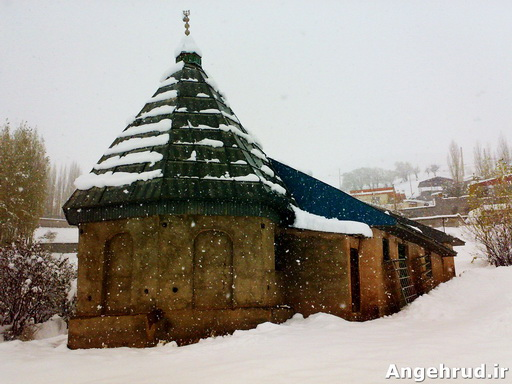 angehrud.ir